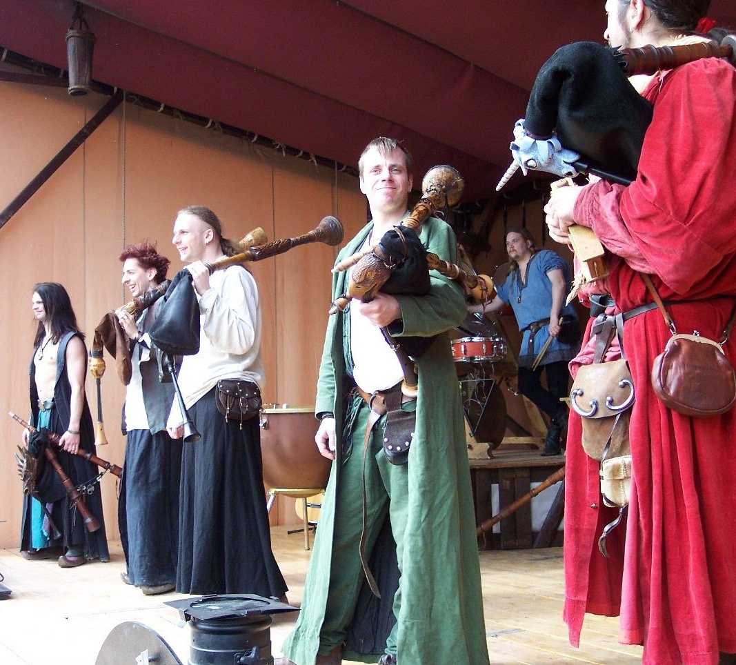 Saltatio Mortis